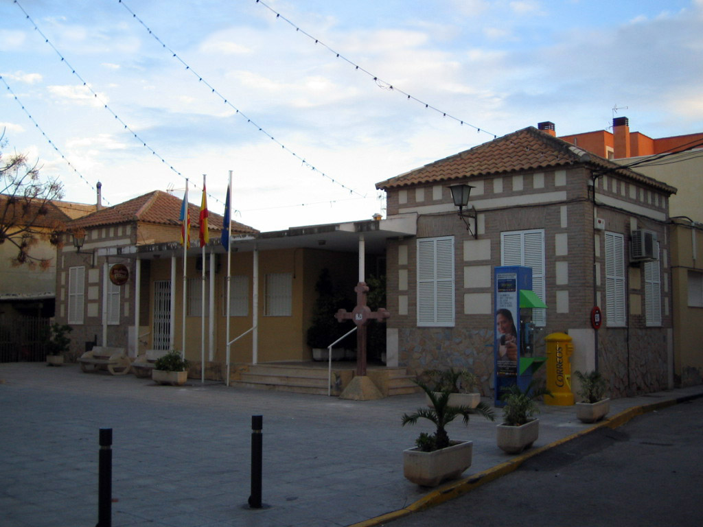 Centro Social de Desamparados (Orihuela). En el se dan los servicios de policía local, de salud y de la oficina municipal del alcalde. También se haya el hogar del pensionista.